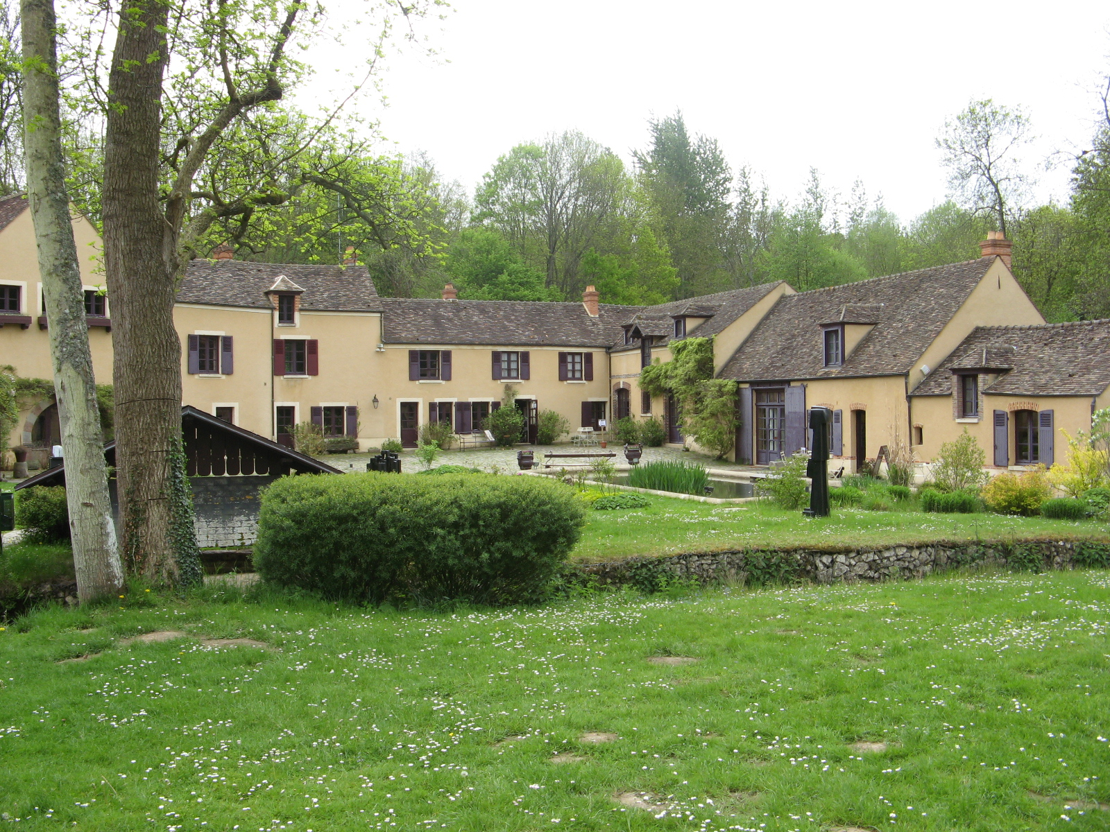 Moulin de Villeneuve à Saint-Arnoult-en-Yvelines, demeure d'Elsa Triolet et Louis Aragon